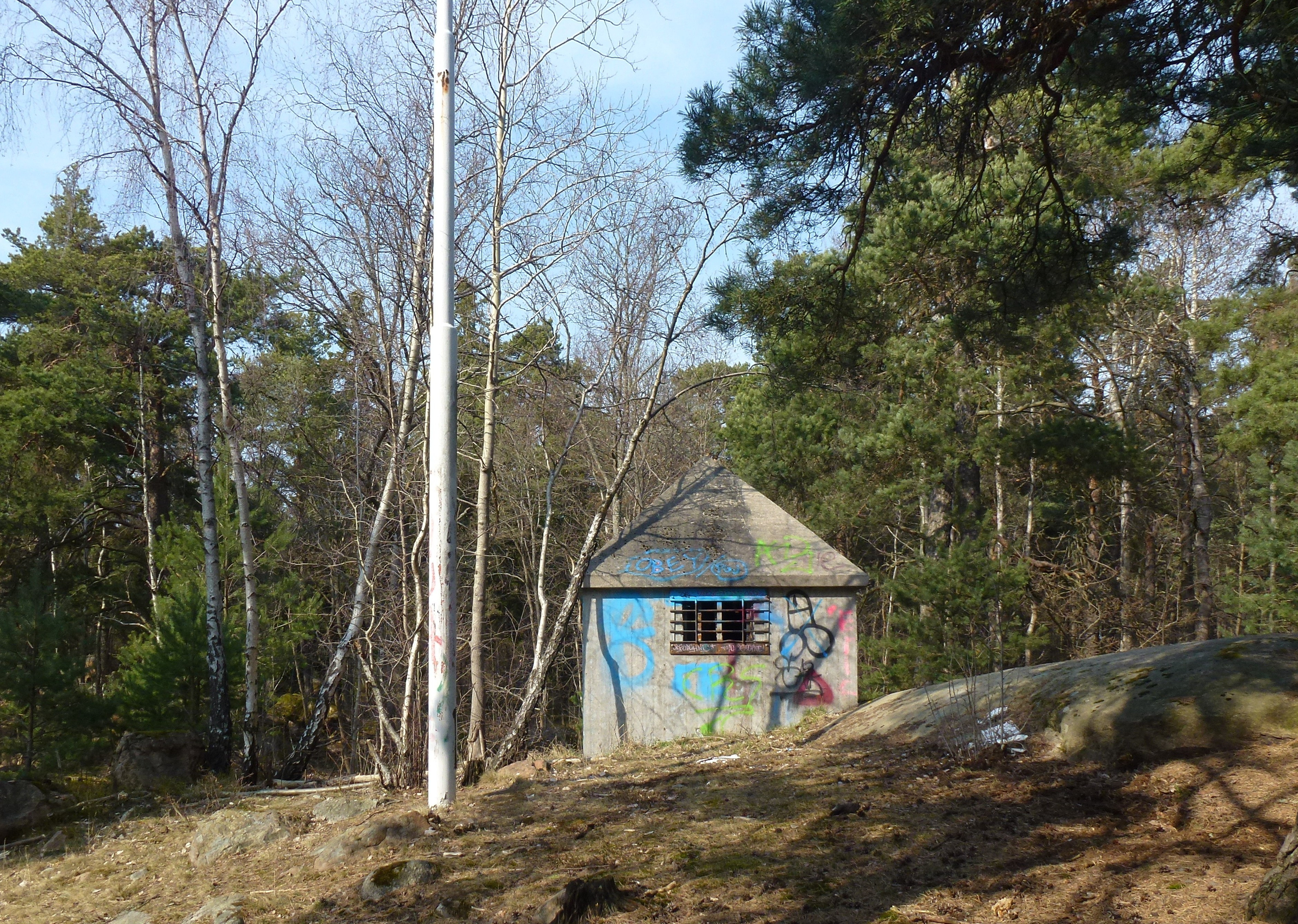 FE (framskjuten enhet) "Liljan" i Bromma, radiomast och reservutgång